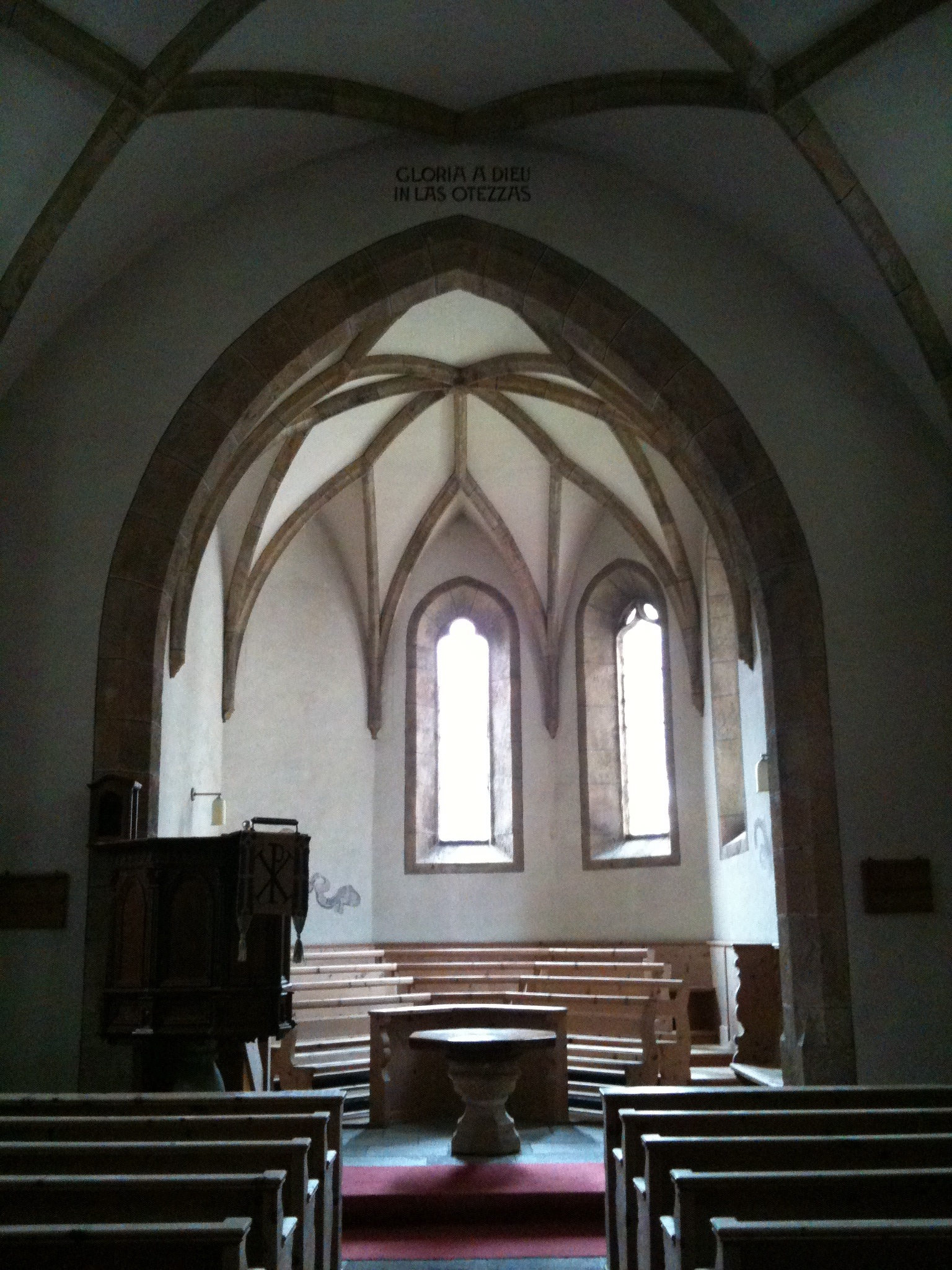 reformierte Kirche Santa Maria Val Müstair (Kanton Graubünden)